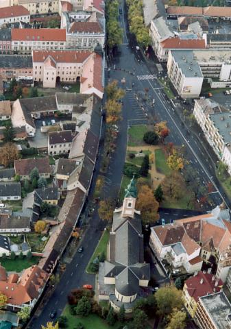 Nagykanizsa, Hungary, aerialphotography